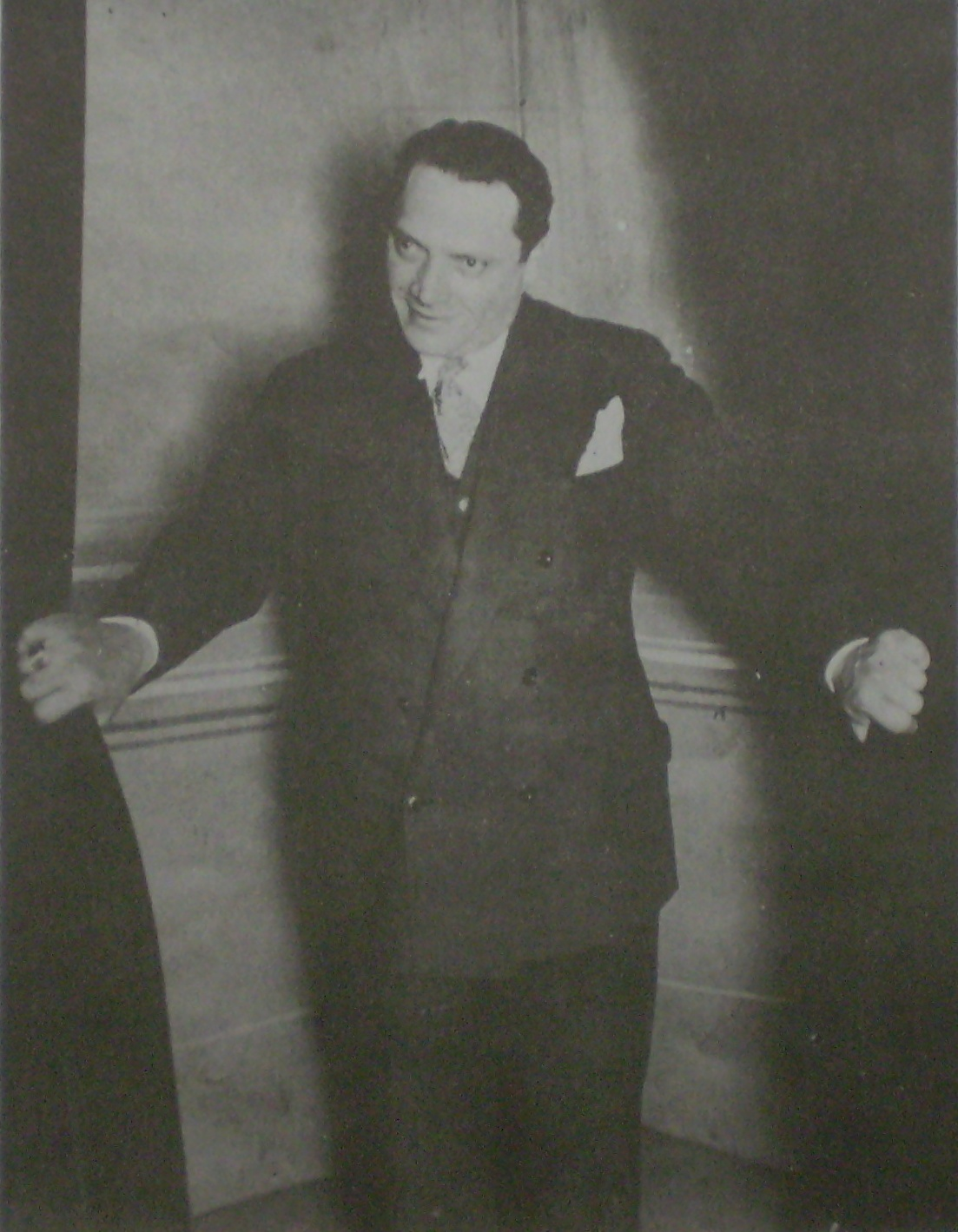 Alberto Vaccarezza